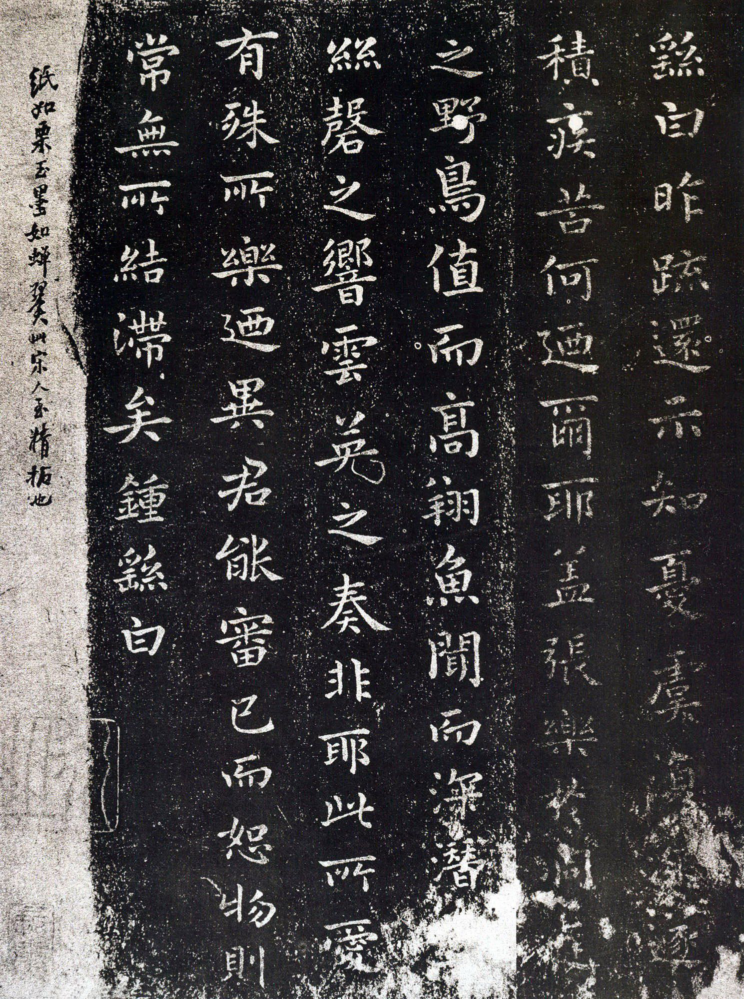 文言: 宋拓還示帖